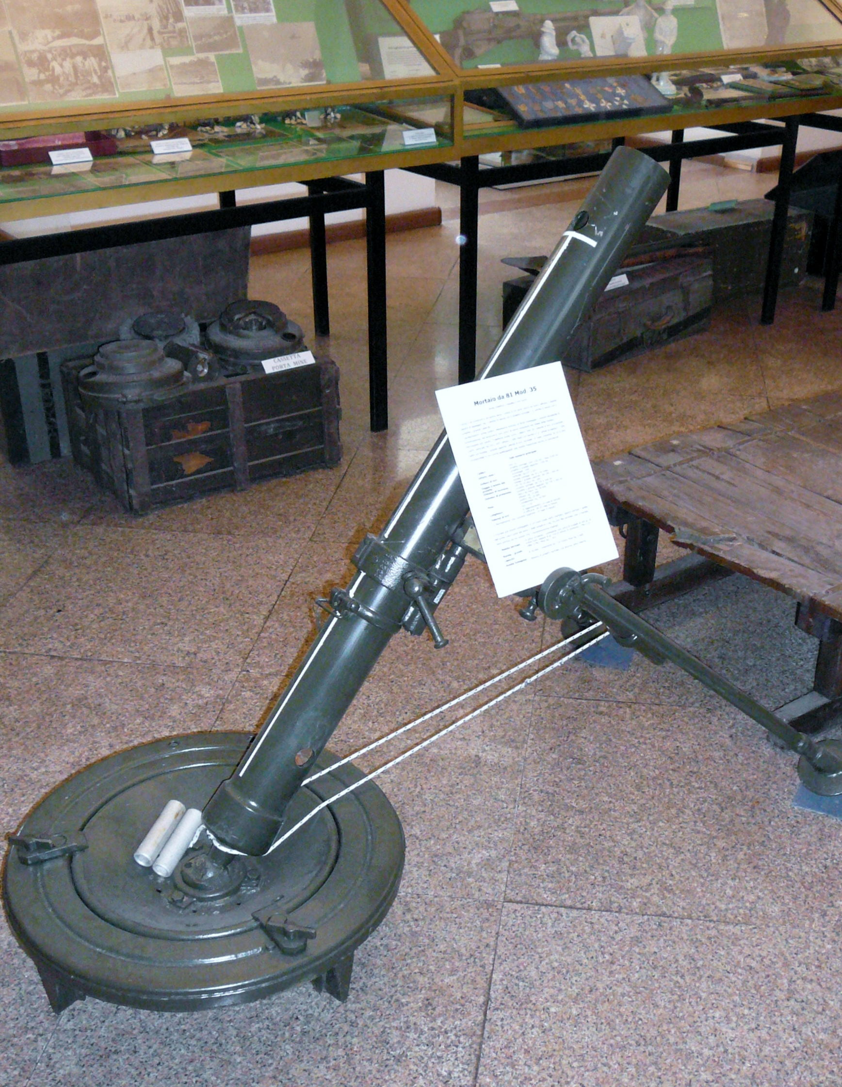 Mortaio da 81 Mod. 35 al museo degli alpini a Trento